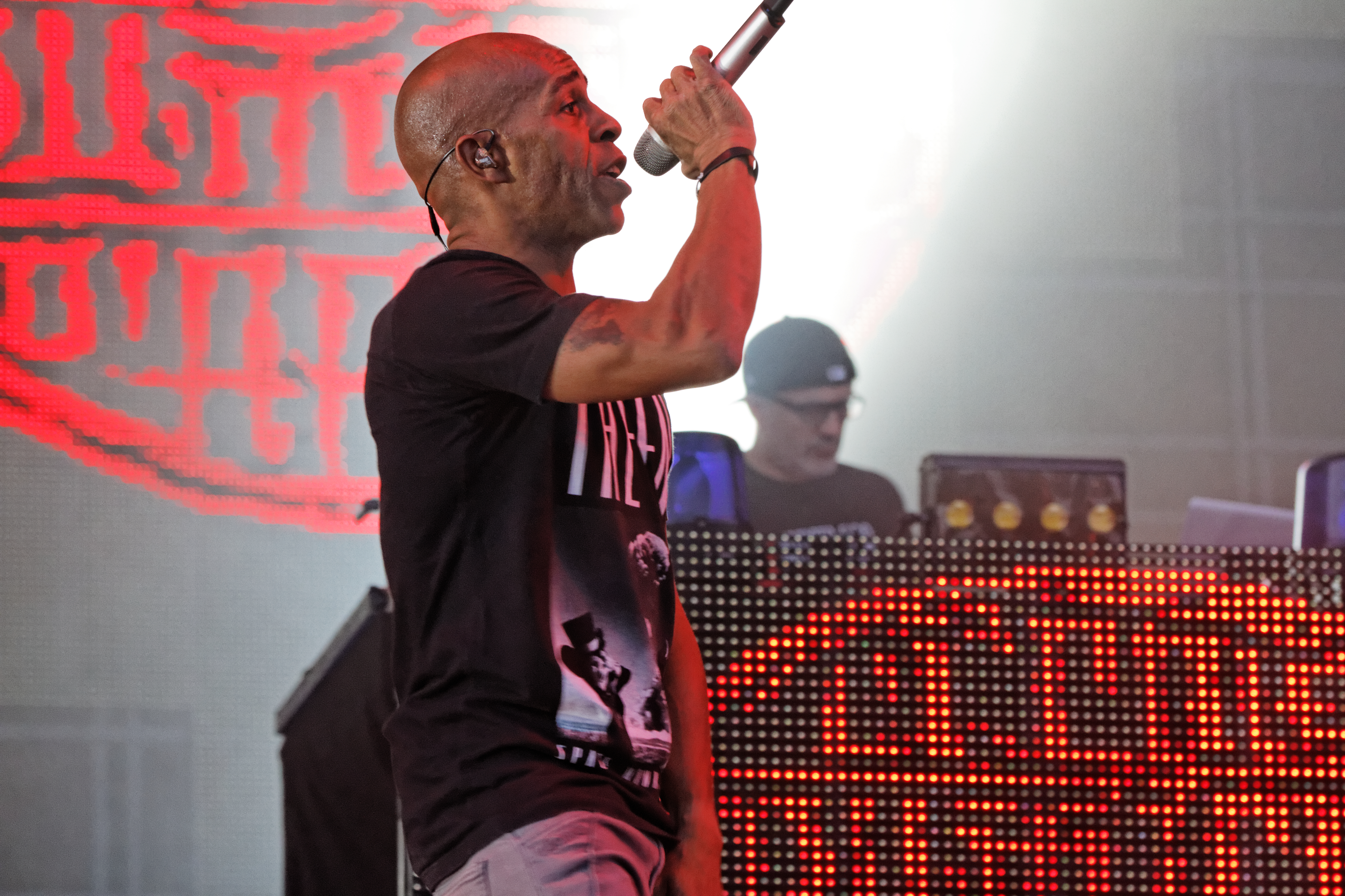 IAM en concert sur la grande scène lors de la fête de l'Humanité 2014.